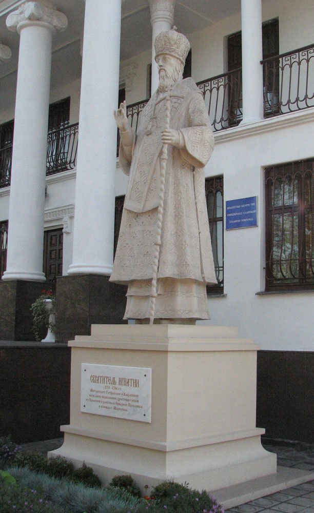 Памятник Игнатию Мариупольскому, г. Мариуполь (Украина)